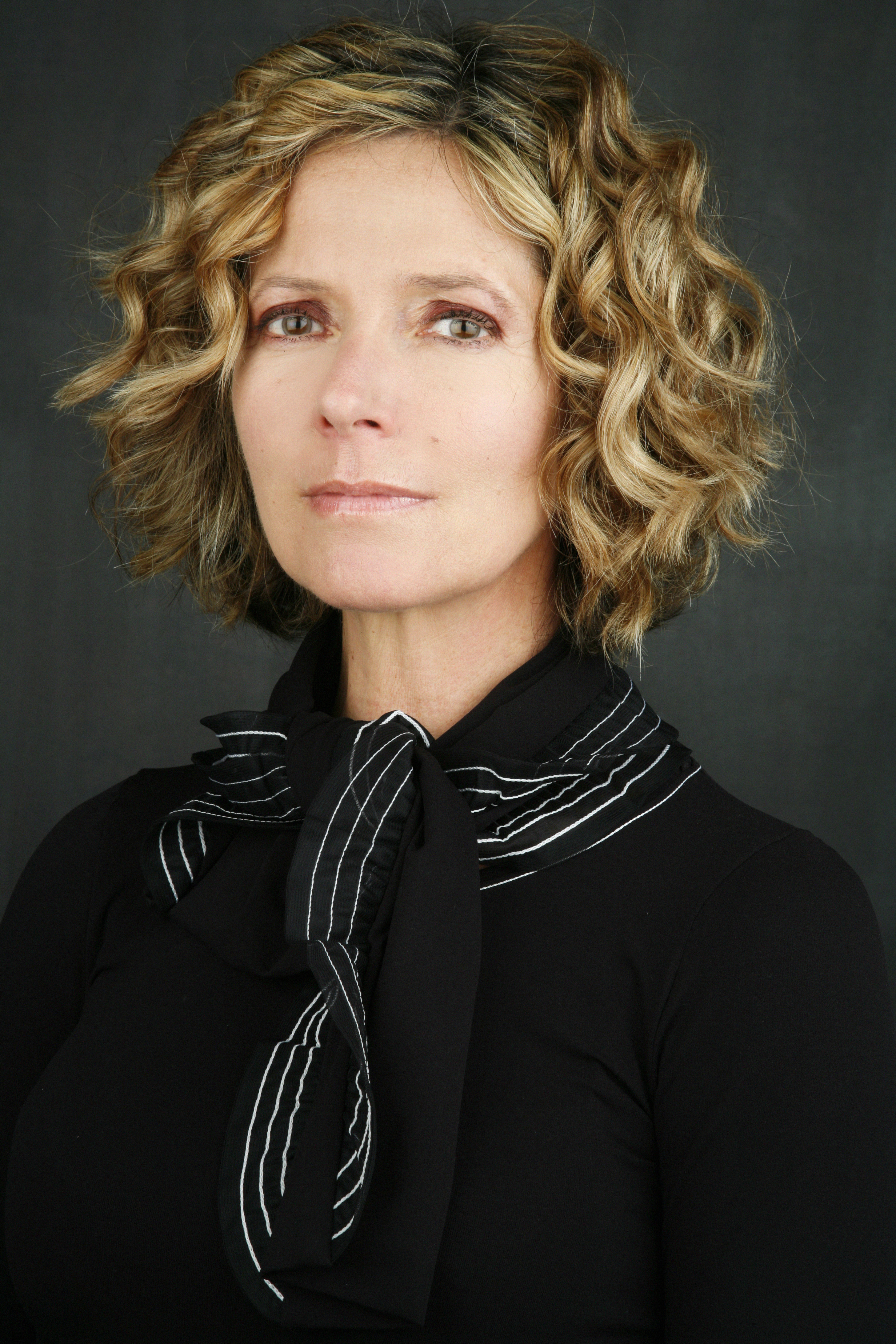 L'attrice e conduttrice Laura Lattuada (immagine messa a disposizione dalla stessa attrice)